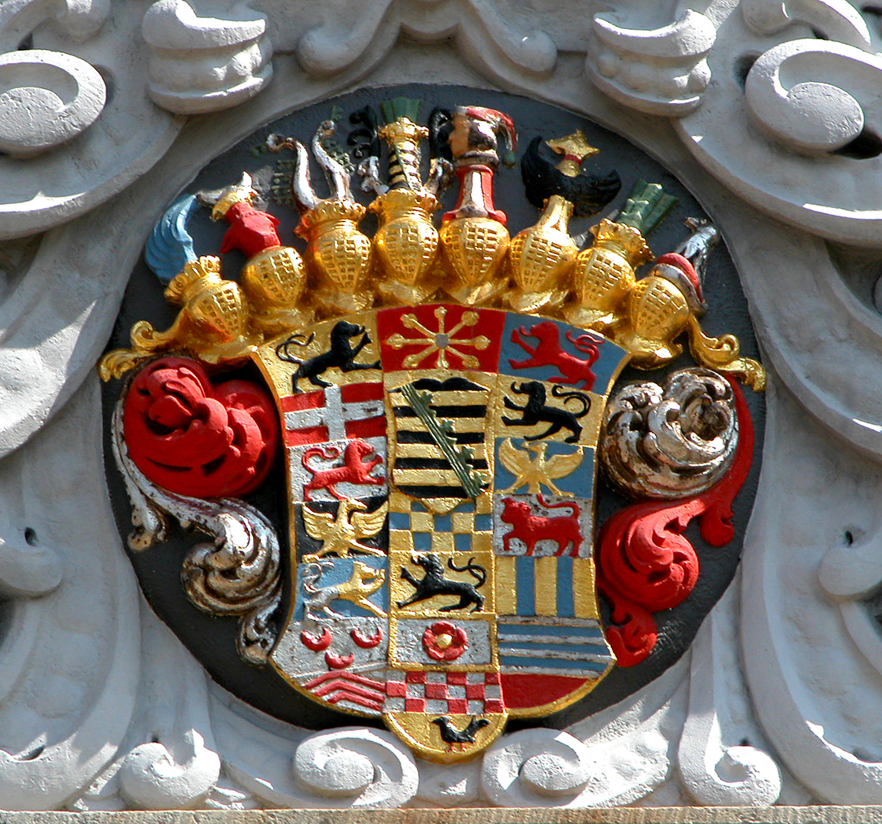 24.04.2015 03253 Doberlug-Kirchhain, Schloßplatz: Das Schloß Doberlug (GMP: 51.610125,13.546201) geht auf den Herrschaftssitz Dobrilugk zurück, der 1551 unter dem sächsischen Berghauptmann Heinrich von Gersdorf begonnen wurde. Kurfürst Johann Georg I. von Sachsen, der 1623 die Herrschaft Dobrilugk in Besitz nahm, ließ das unfertige Schloß als Jagdresidenz ausbauen. Herzog Christian I. von Sachsen-Merseburg vollendete das Vorhaben seines Vaters und baute die Vierflügelanlage nach 1664 prachtvoll aus und hielt dabei noch an den Bauformen der Renaissance fest. 1676 vollendet, ist das Schloß Dobrilugk der letzte Residenzbau der sächsischen Renaissance. 1945 wurde das Schloß von der Roten Armee besetzt, die es in eine Kaserne umwandelte. In der DDR war hier das Eisenbahnpionierausbildungsregiment der Nationalen Volksarmee (NVA) stationiert. Seit 1994 laufen Sanierungsmaßnahmen. 2014 konnte in einigen Räumen des Schlosses schließlich die erste Brandenburgische Landesaustellung gezeigt werden. Wappen des Herzogtums Sachsen-Merseburg über dem Westportal. [DSCN4932.JPG]20150424325DR.JPG(c)Blobelt